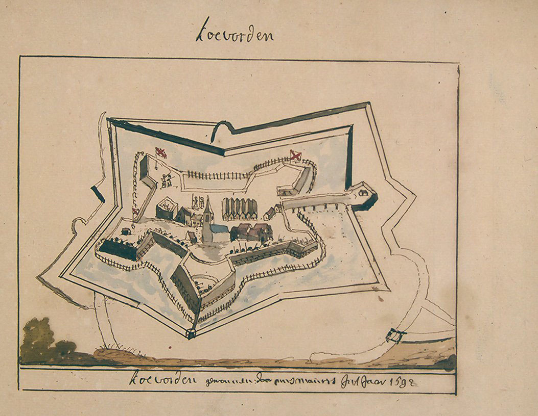 Beschrijving van het Landschap Drente, met Afbeeldingen der voornaamste Huizen